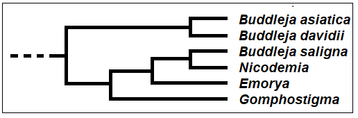 Buddlejeae - Cladogramma della tribù.png